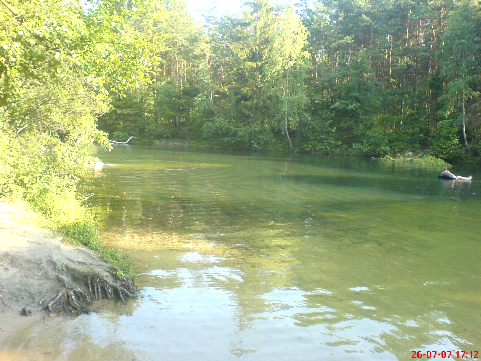 Zabnik Valley